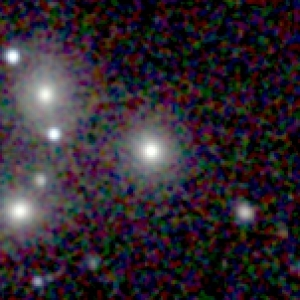 Galaxy NGC 68